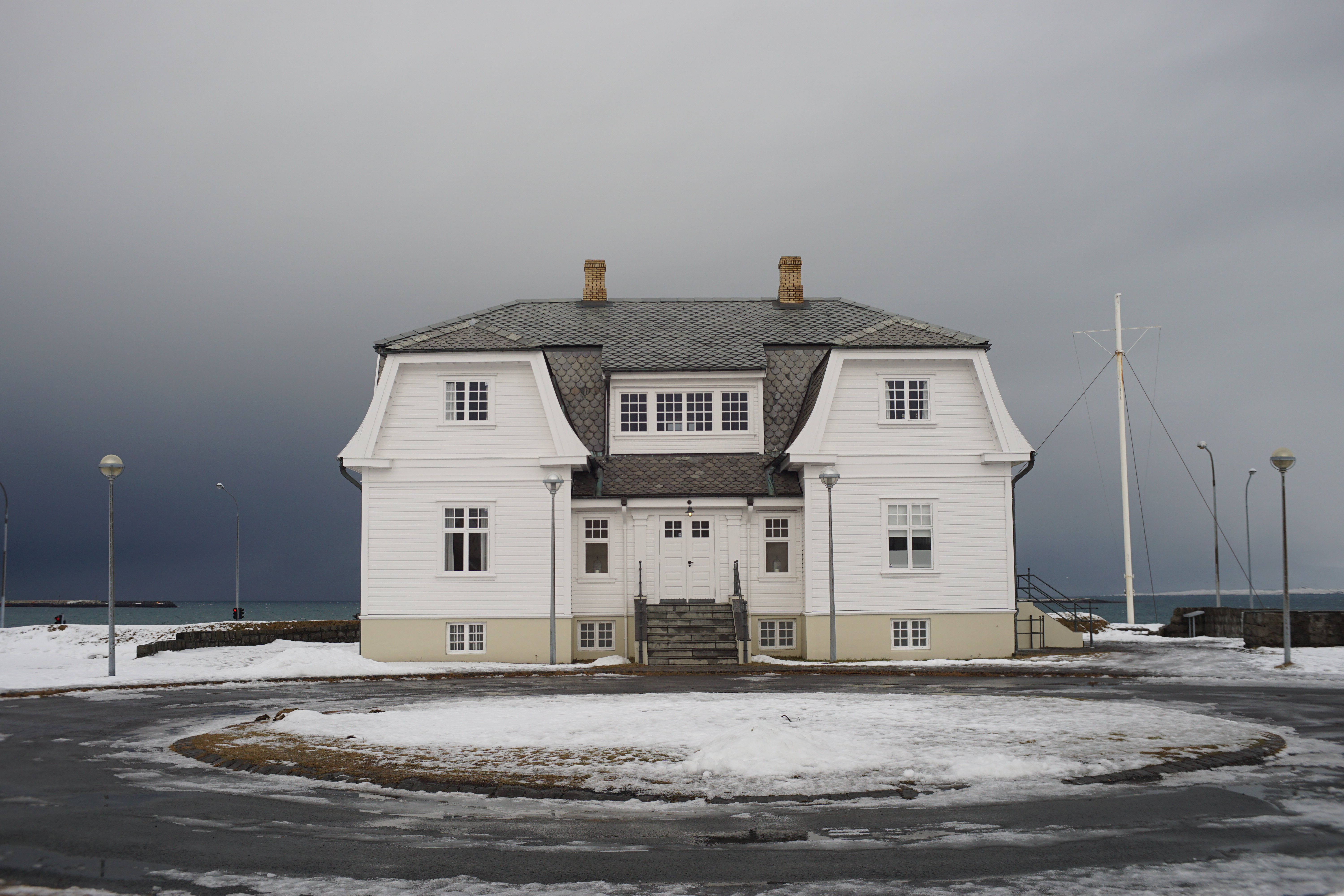 Casa Höfði Reikiavik